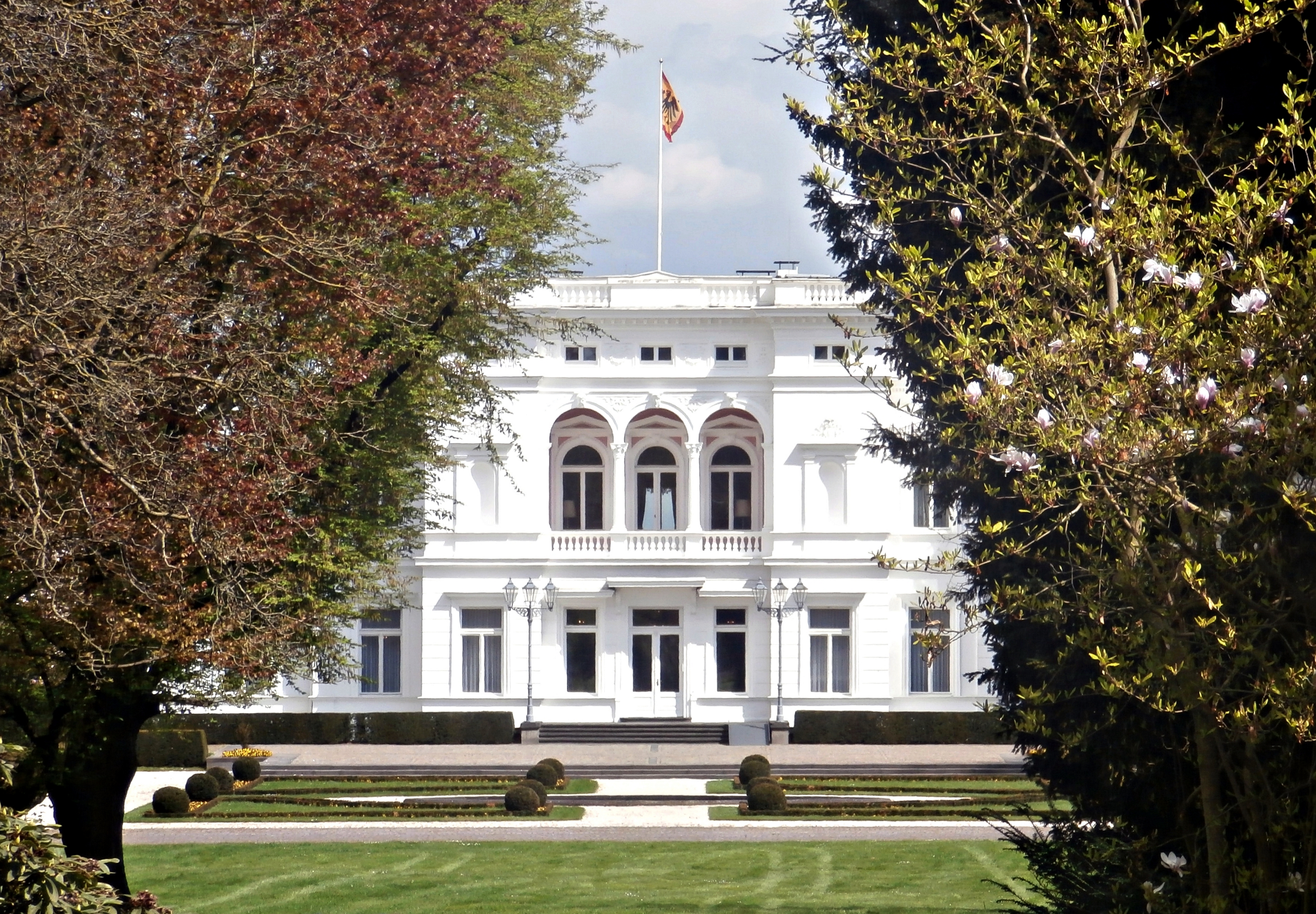 Villa Hammerschmidt, Adenauerallee 135, Bonn-Gronau: Standarte des Bundespräsidenten während des Staatsakts für Hans-Dietrich Genscher in Bonn